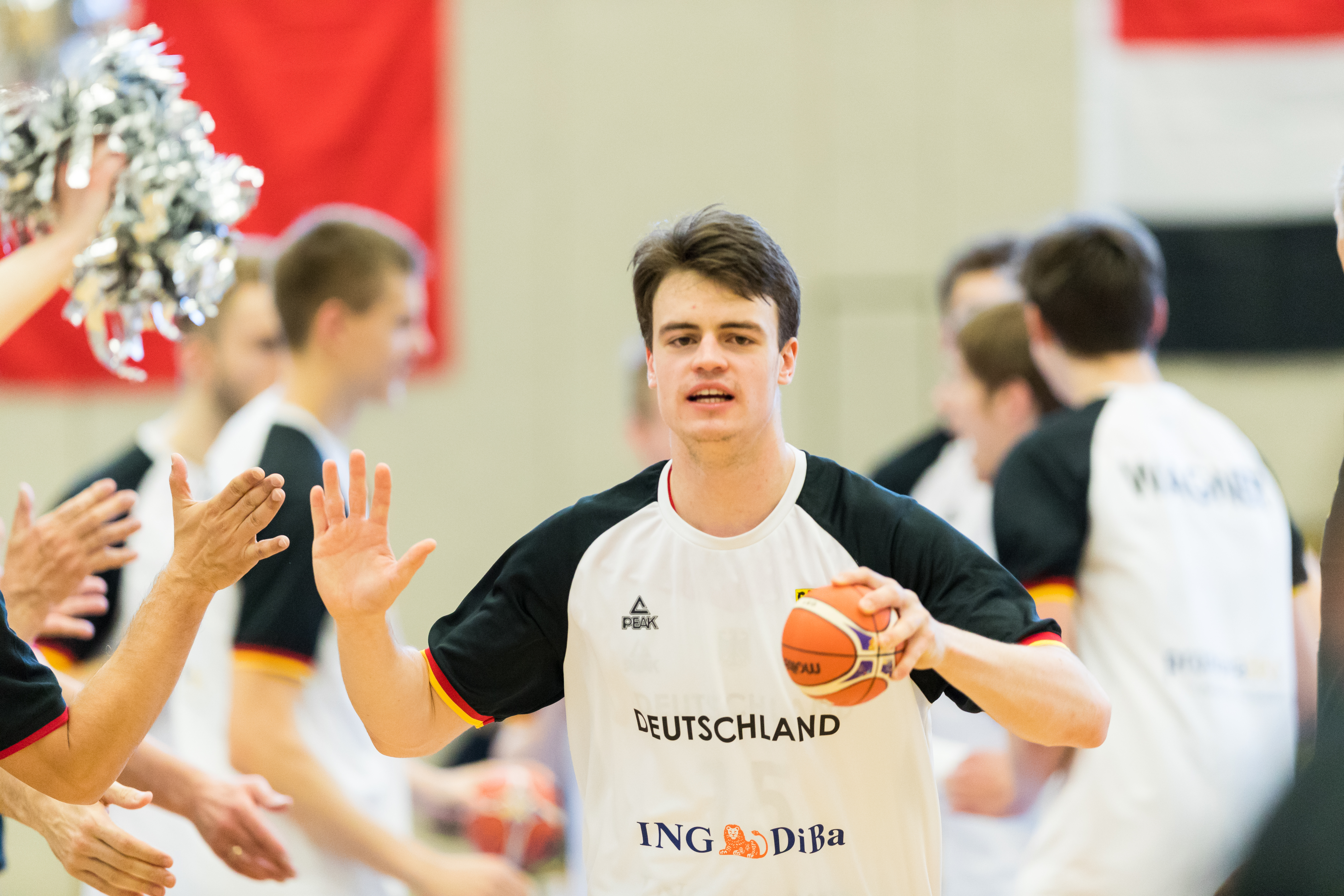 Australia vs Germany 66:88 during final Basketball Albert Schweitzer Turnier at GBG Halle, Mannheim, Baden-Württemberg, Germany on 2018-04-07, Photo: Sven Mandel